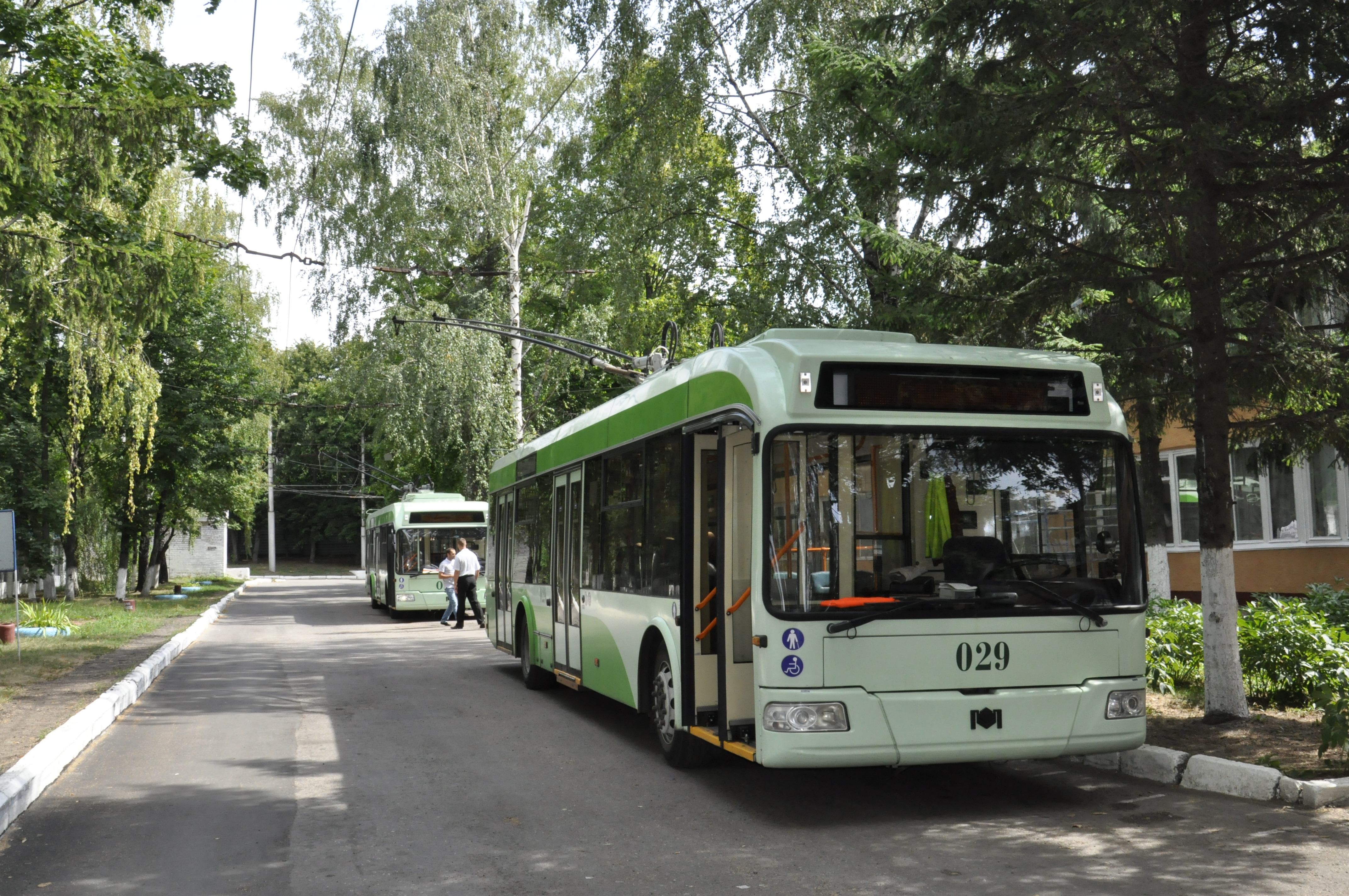 Троллейбус БКМ-321